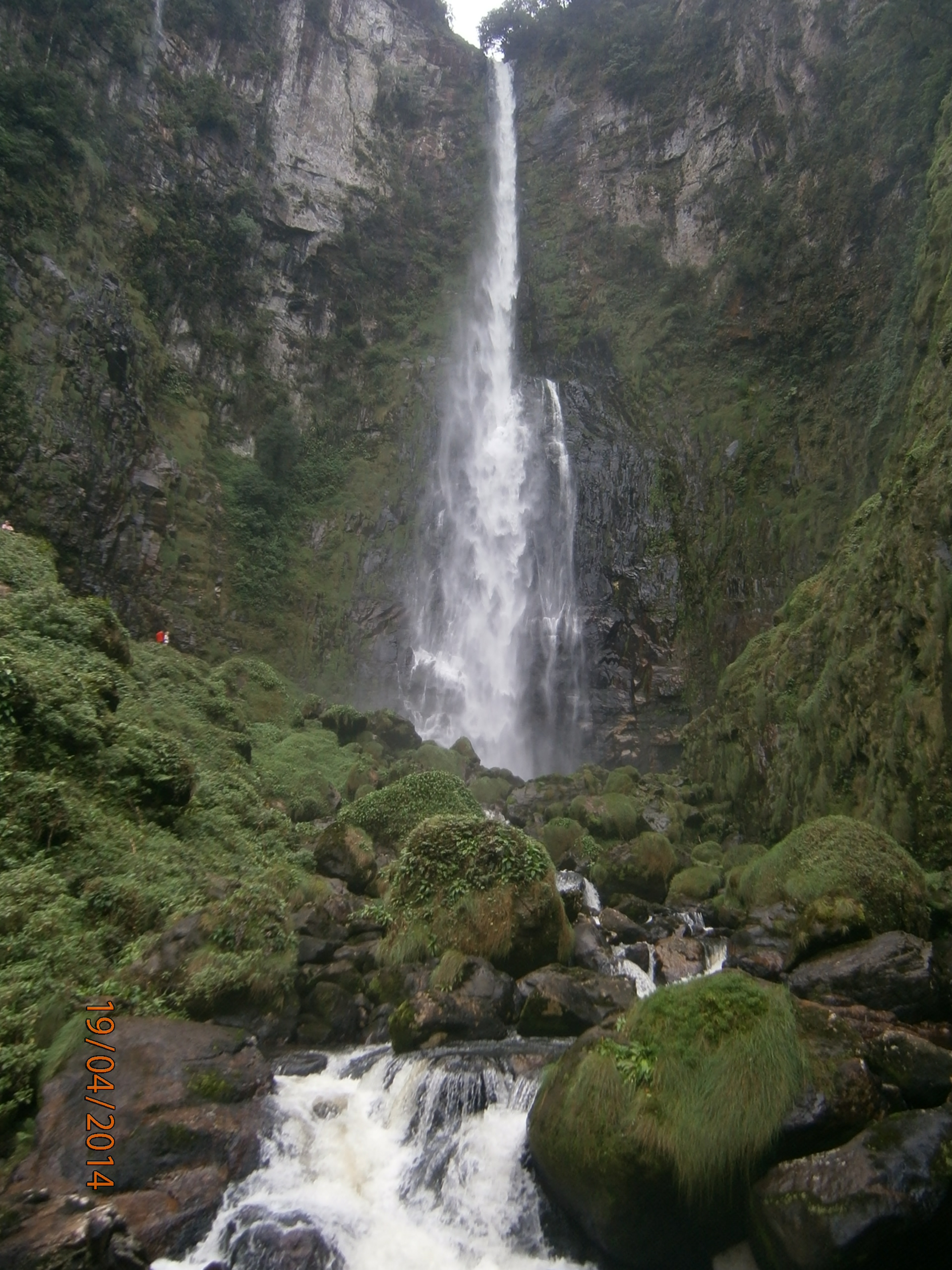 A última de 14 cachoeiras, com 125m de queda localizada na Rota das Cachoeiras no município de Corupá/SC.